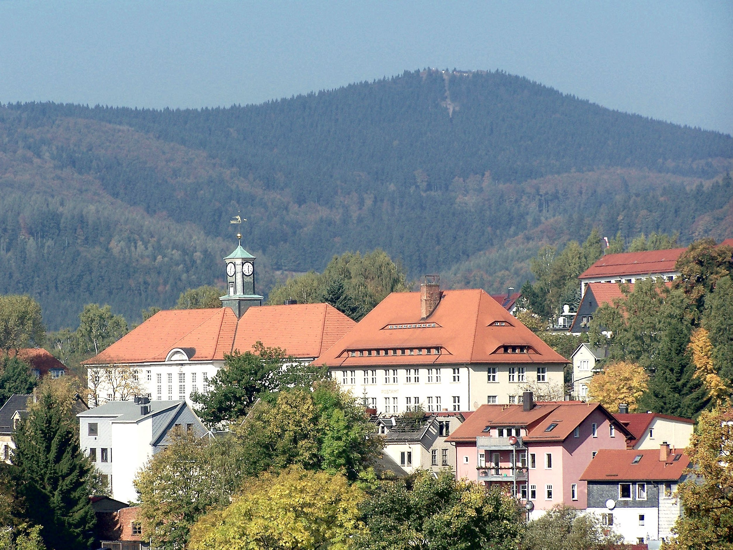 Rathaus von Zella-Mehlis/Thueringen, im Hintergrund der Ruppberg